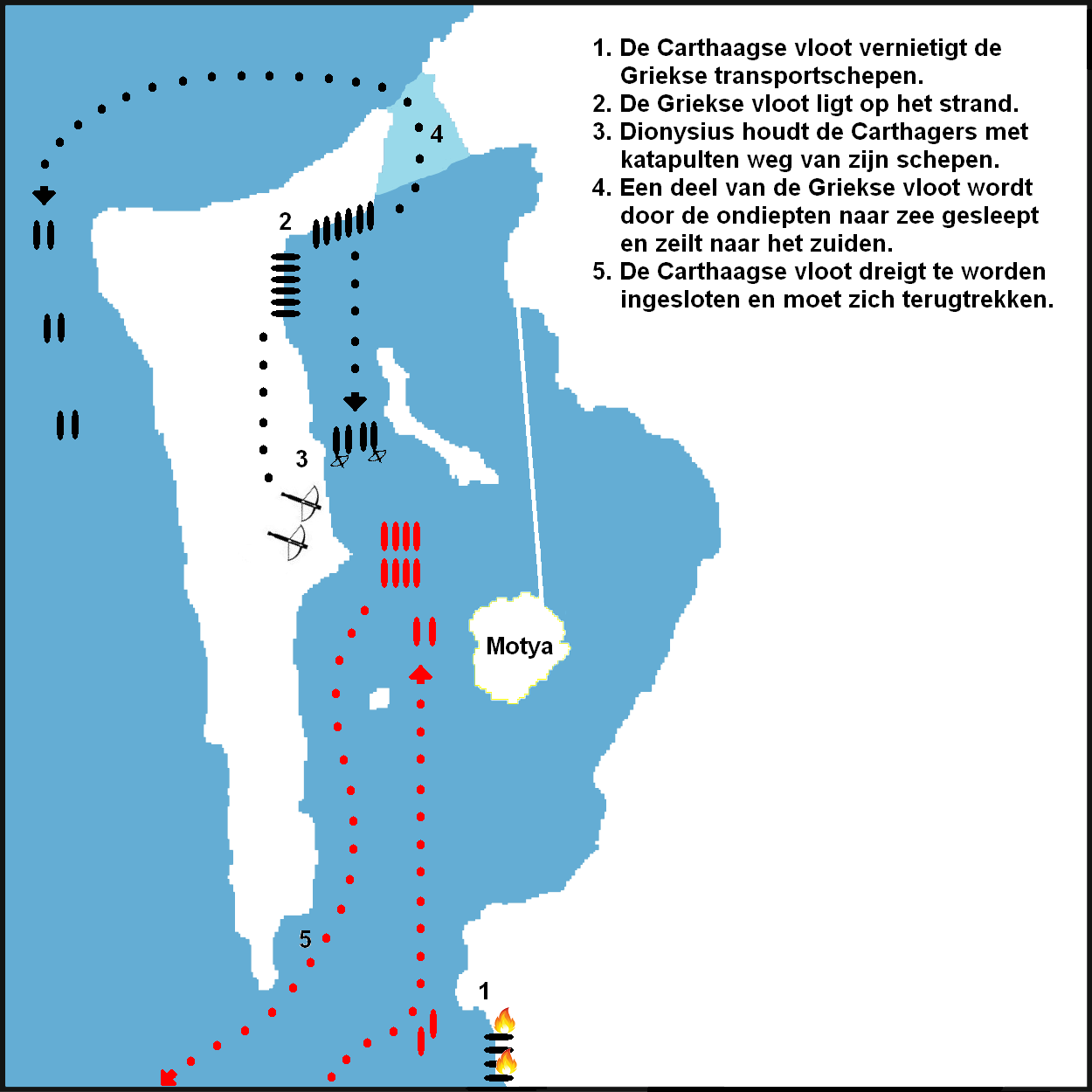 Nederlandstalige kaart van de zeeslag bij Motya in 398 v.c. Basiskaart File:Mozia (posizione).png. Invulling gebaseerd op File:Himilco398.PNG.